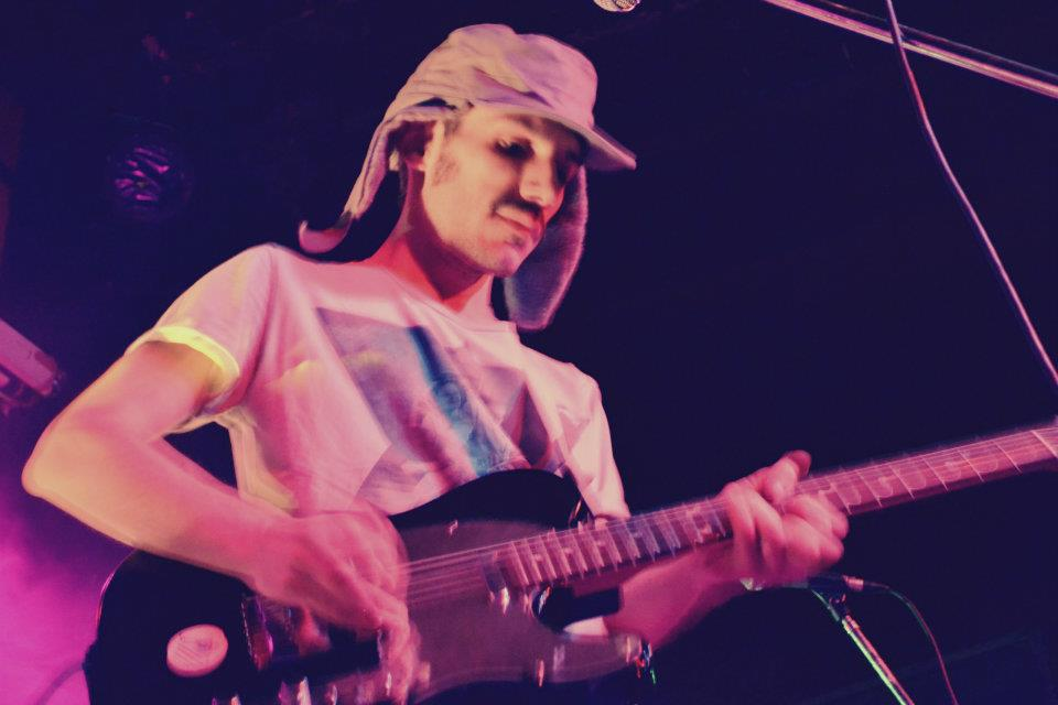 Jo goyeneche en 2013